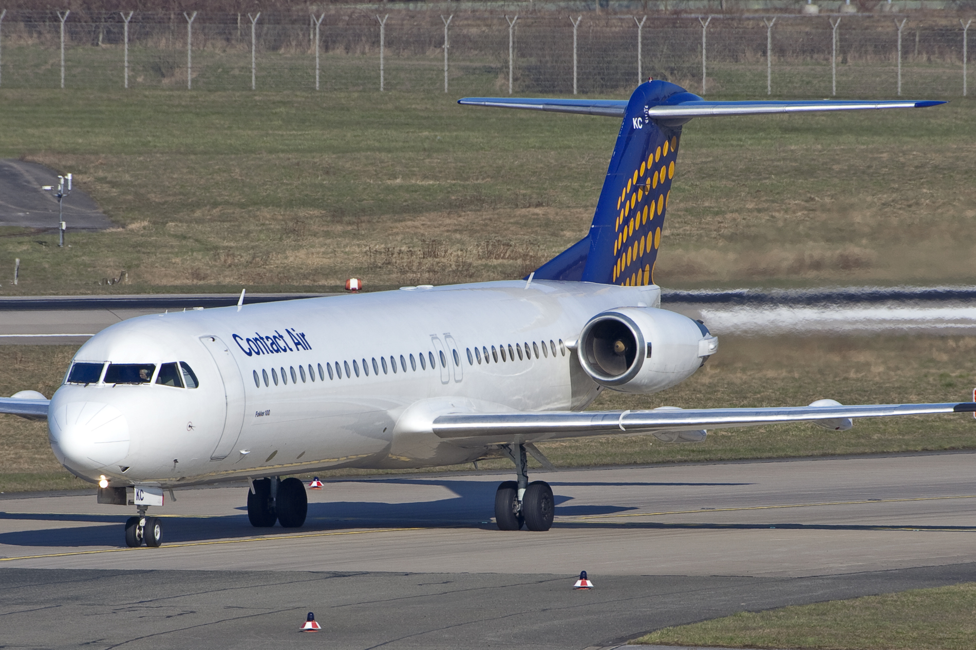 Dusseldorf